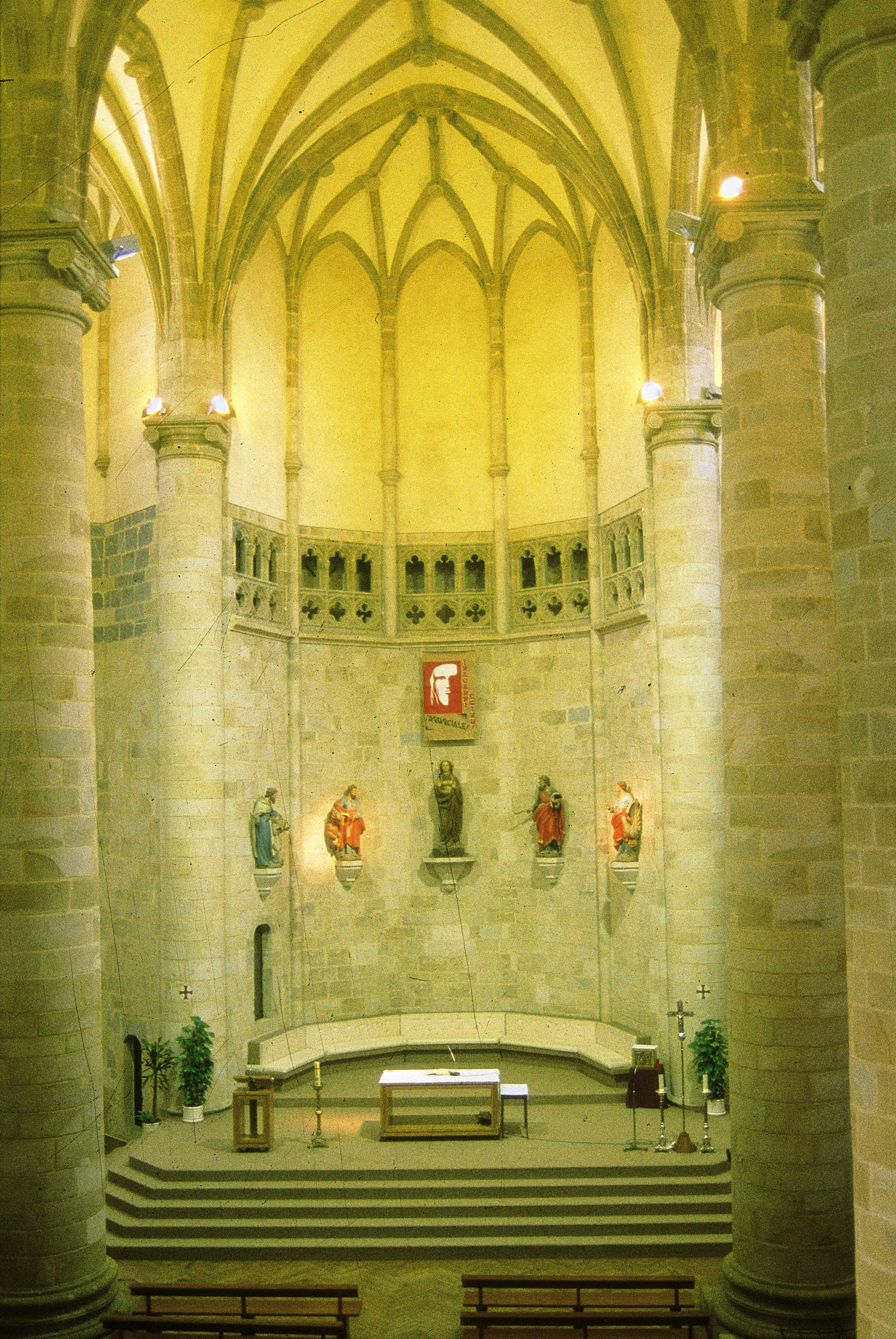 Gernikako Andra Mari Eliza. 1914-1775 Euskal Gotiko estiloko eliza.